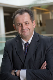 Photo de Guillaume Sarkozy